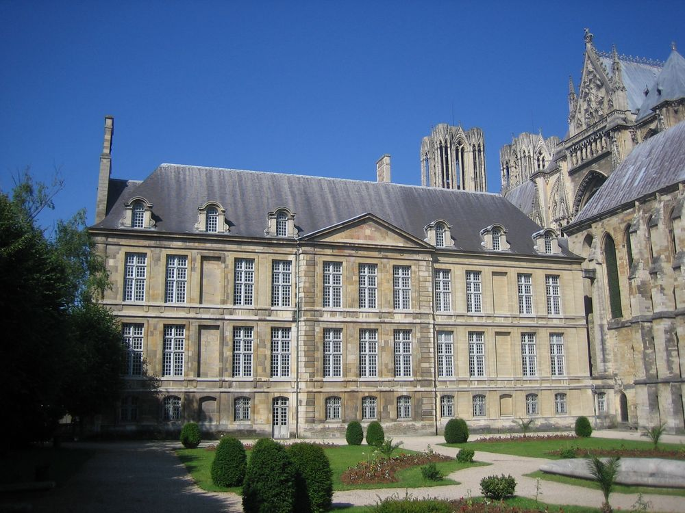 Arrière du Palais du Tau près de la cathédrale à Reims (Marne, Champagne-Ardennes)